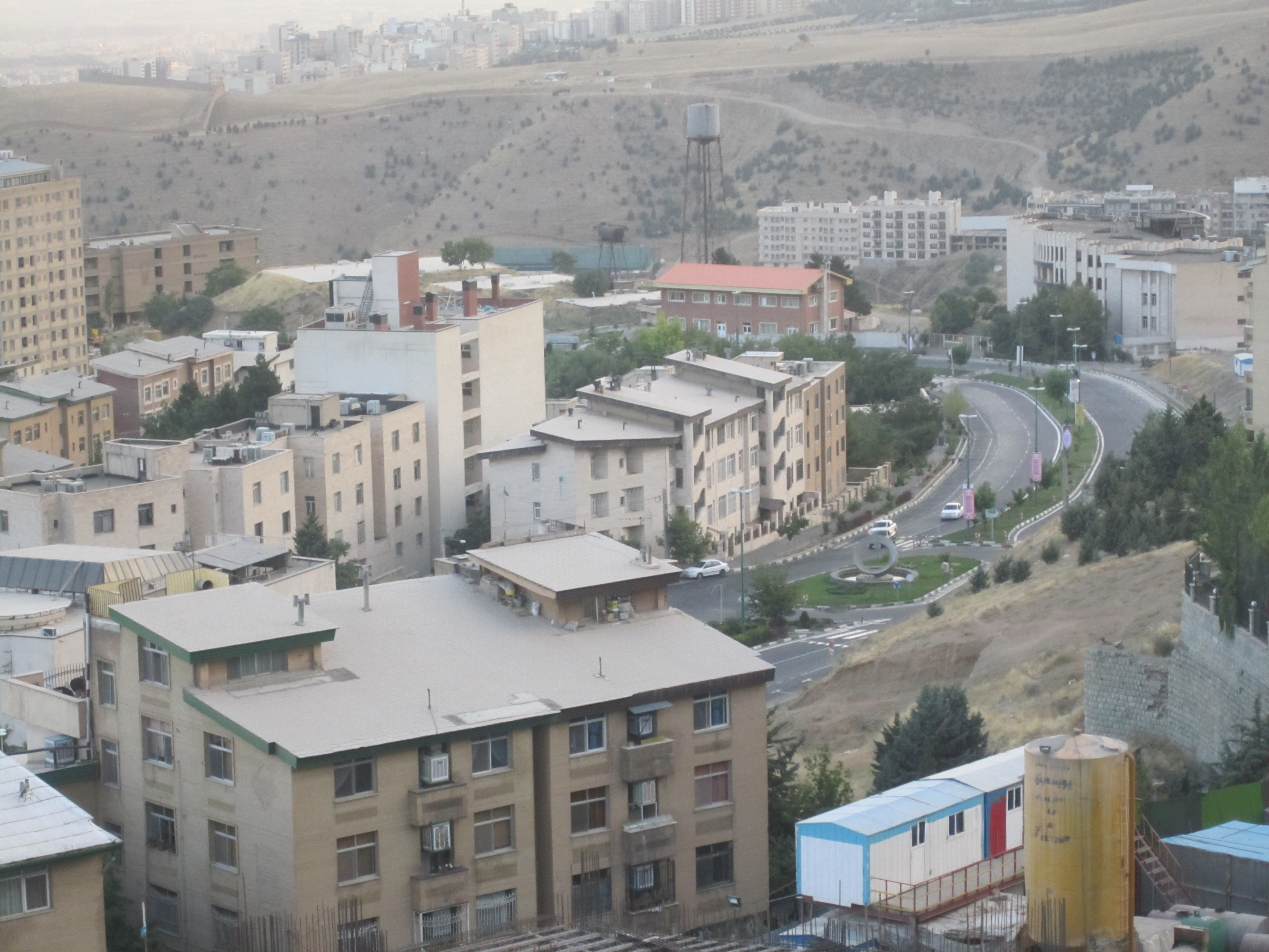 ولنجک